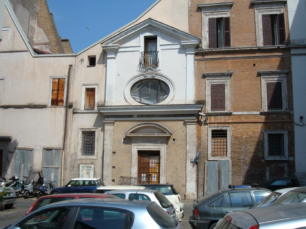 Chiesa di San Simeone profeta, chiesa sconsacrata di Roma, nel rione Ponte.